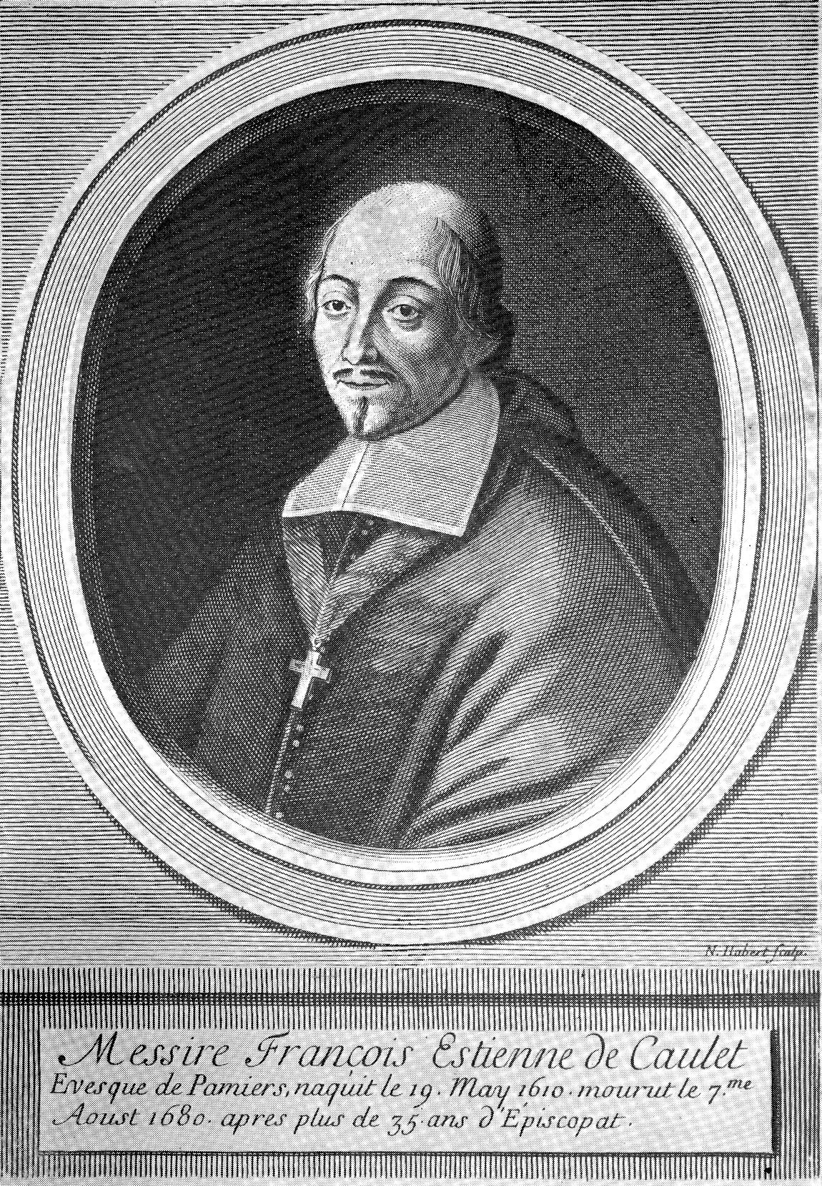 Gravure de Nicolas Habert représentant François-Etienne de Caulet, évêque de Pamiers.